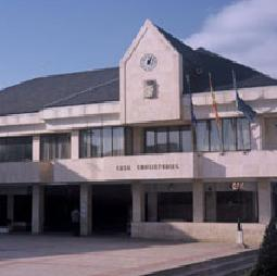 Ayuntamiento de El Franco, Asturias.